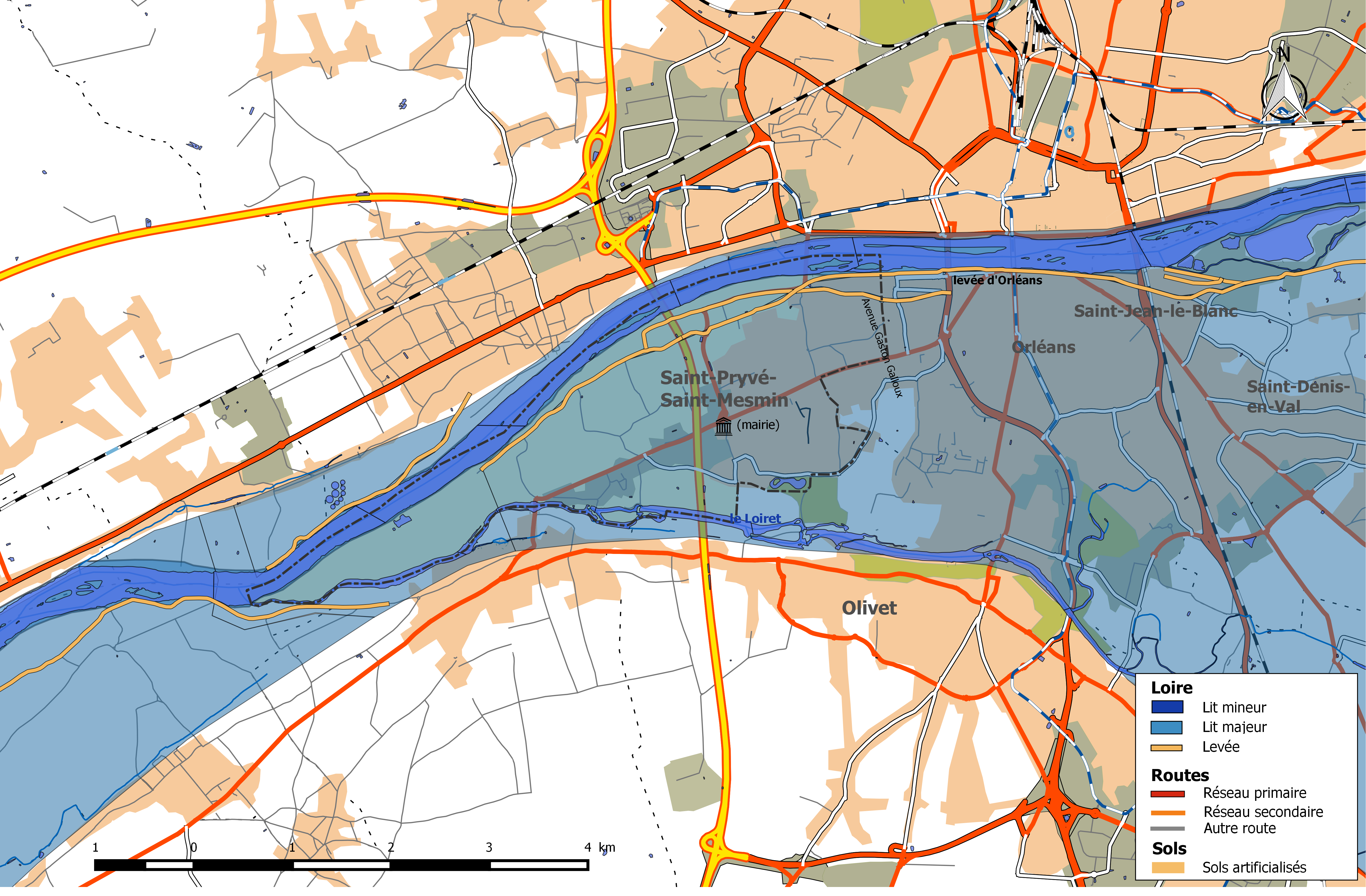 Zone inondable et réseaux hydrographique et routier de la commune de Saint-Pryvé-Saint-Mesmin.